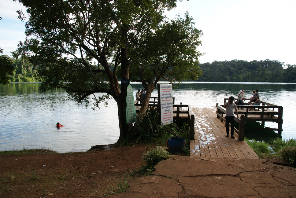 Banlung - Lake Yaklom